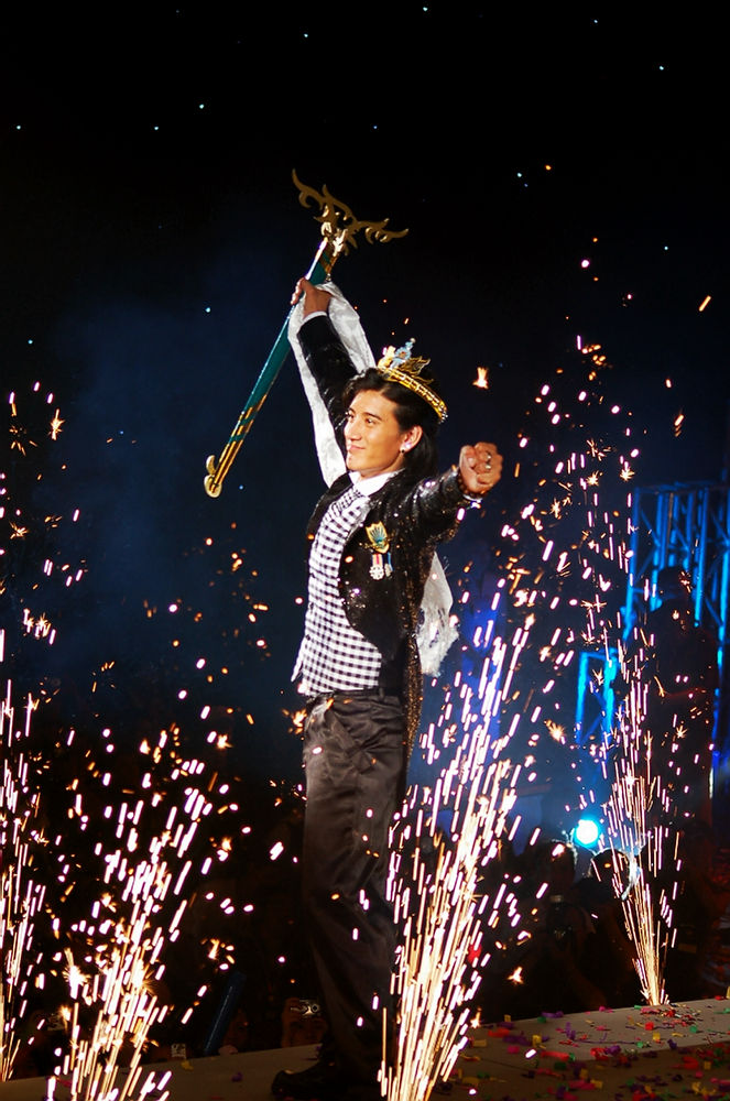 东方卫视《加油！好男儿》2006年全国总冠军蒲巴甲。